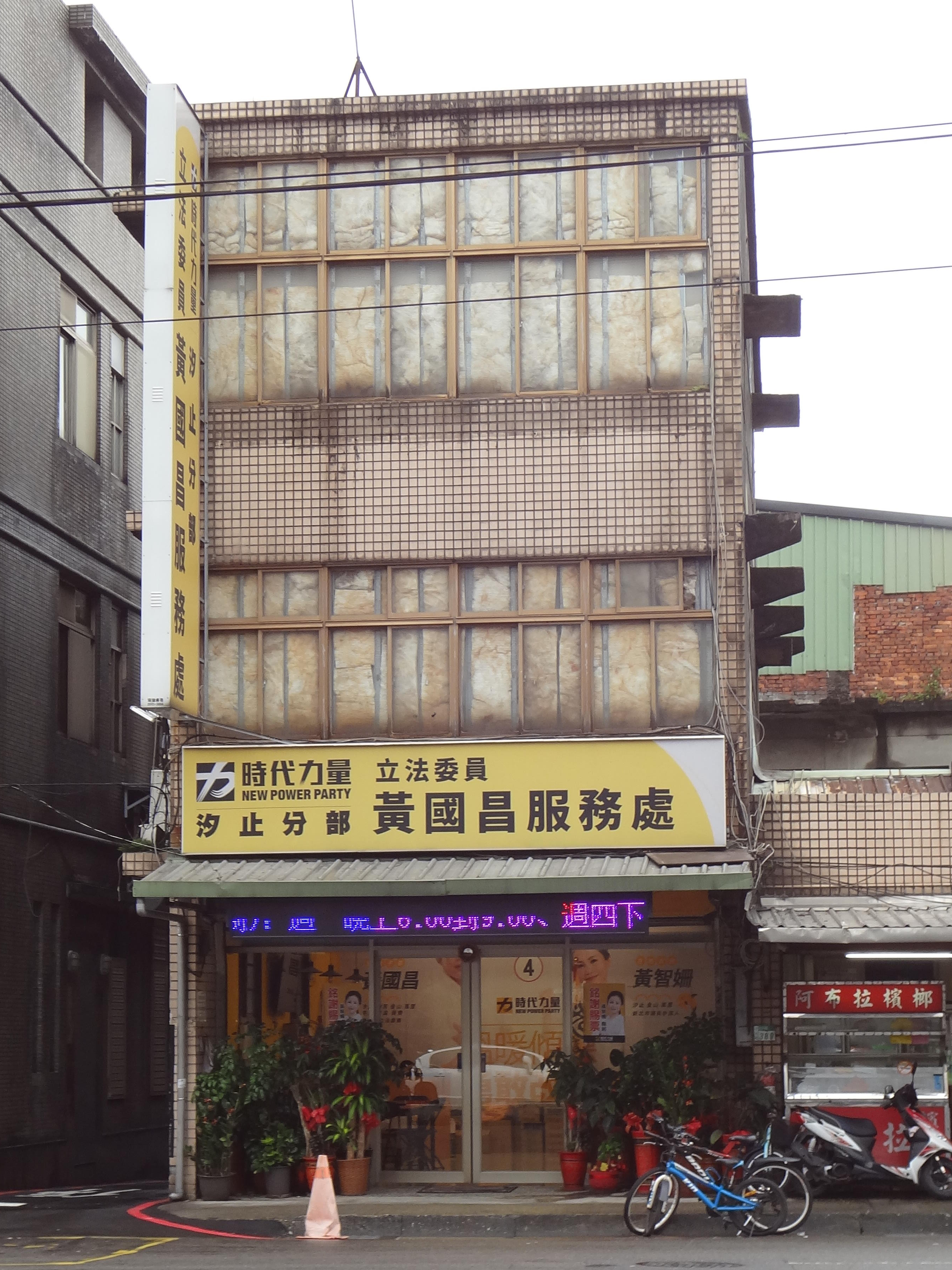 時代力量汐止分部立法委員黃國昌服務處，地址：新北市汐止區大同路二段387號。